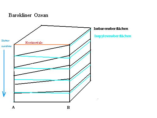 selbst gezeichnet